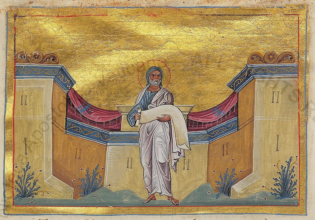 Константинополь. 985 г. Миниатюра Минология Василия II. Ватиканская библиотека. Рим.